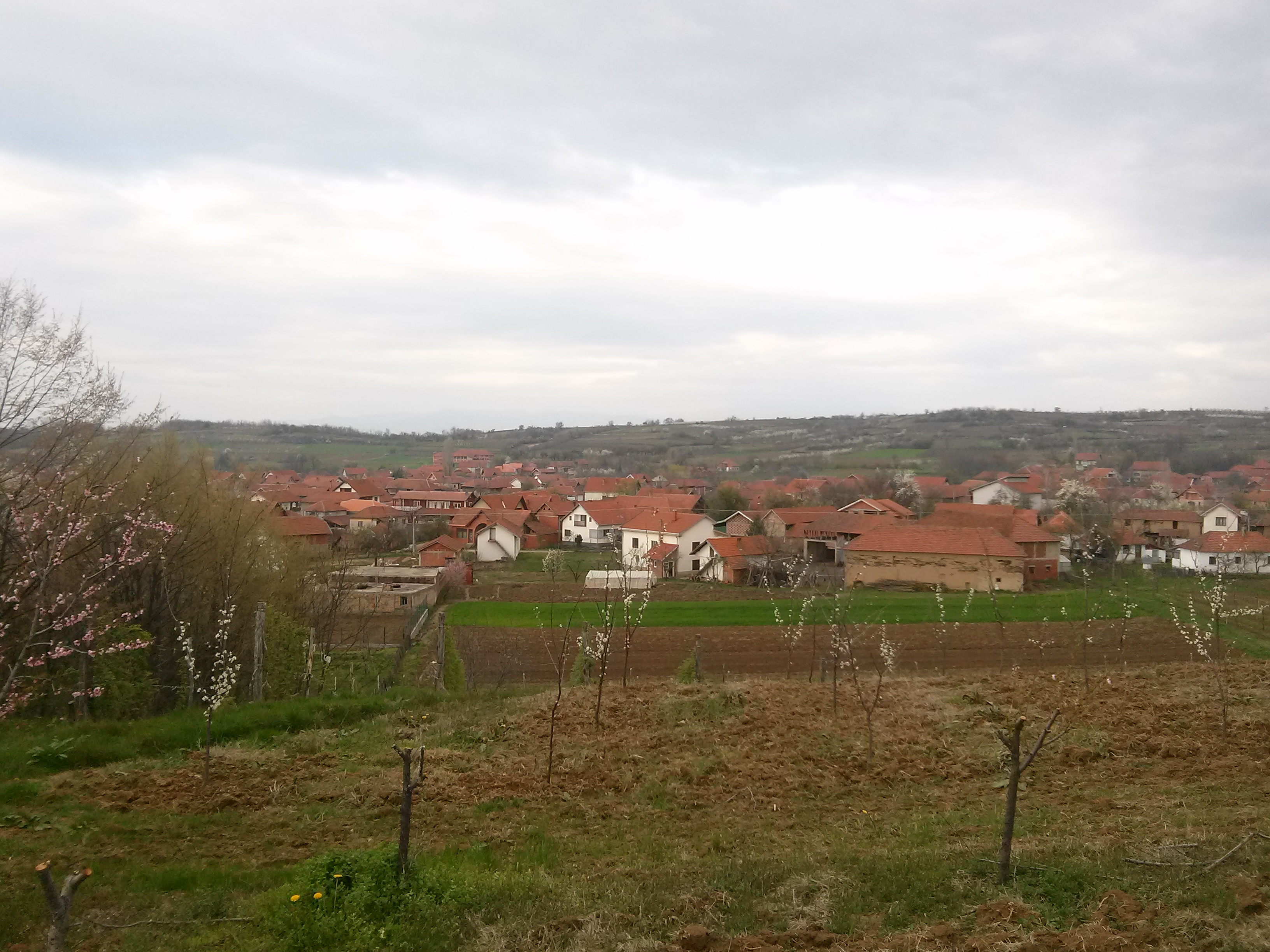 Srpski (latinica): Nakrivanj, Leskovac